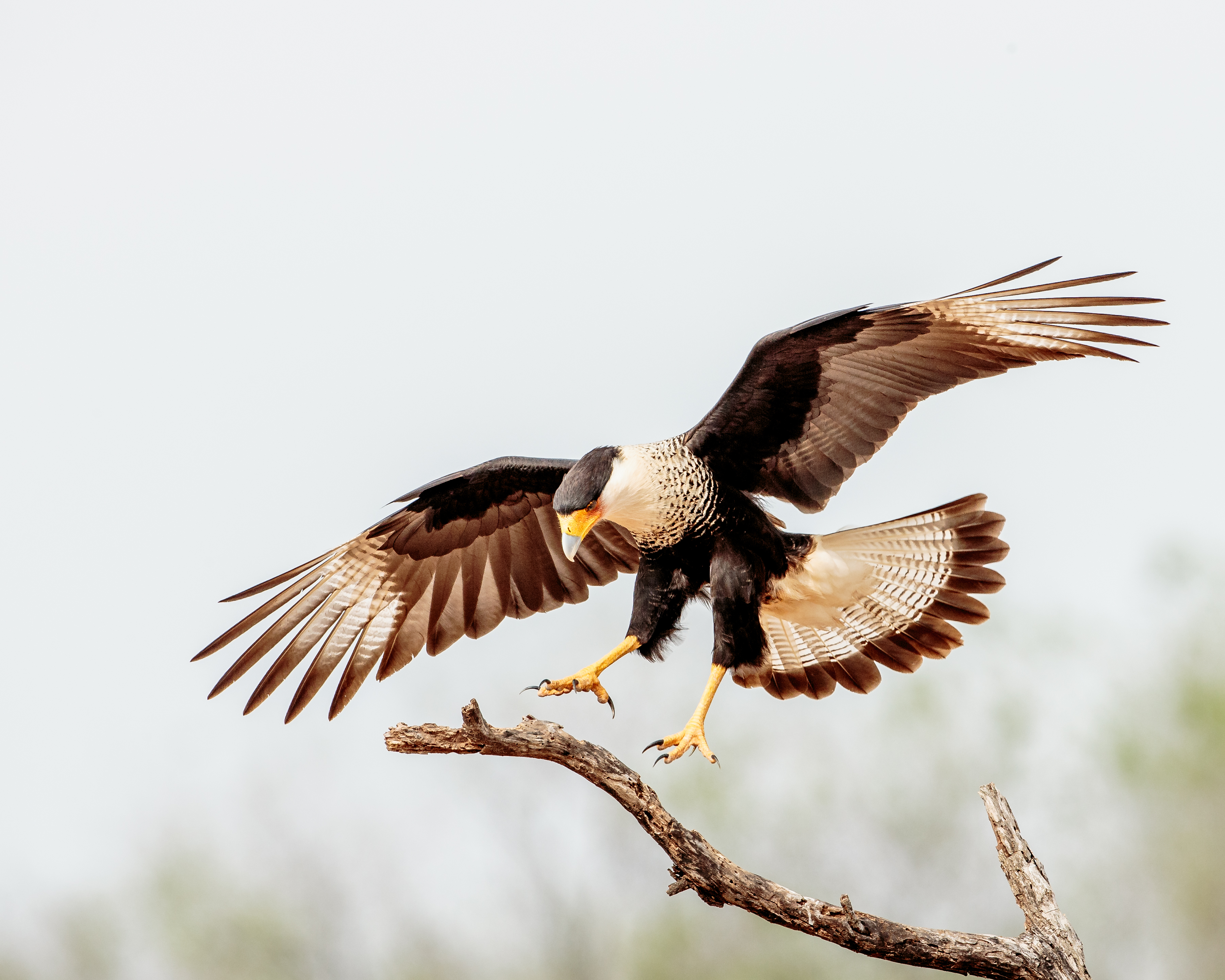 Taken in Texas